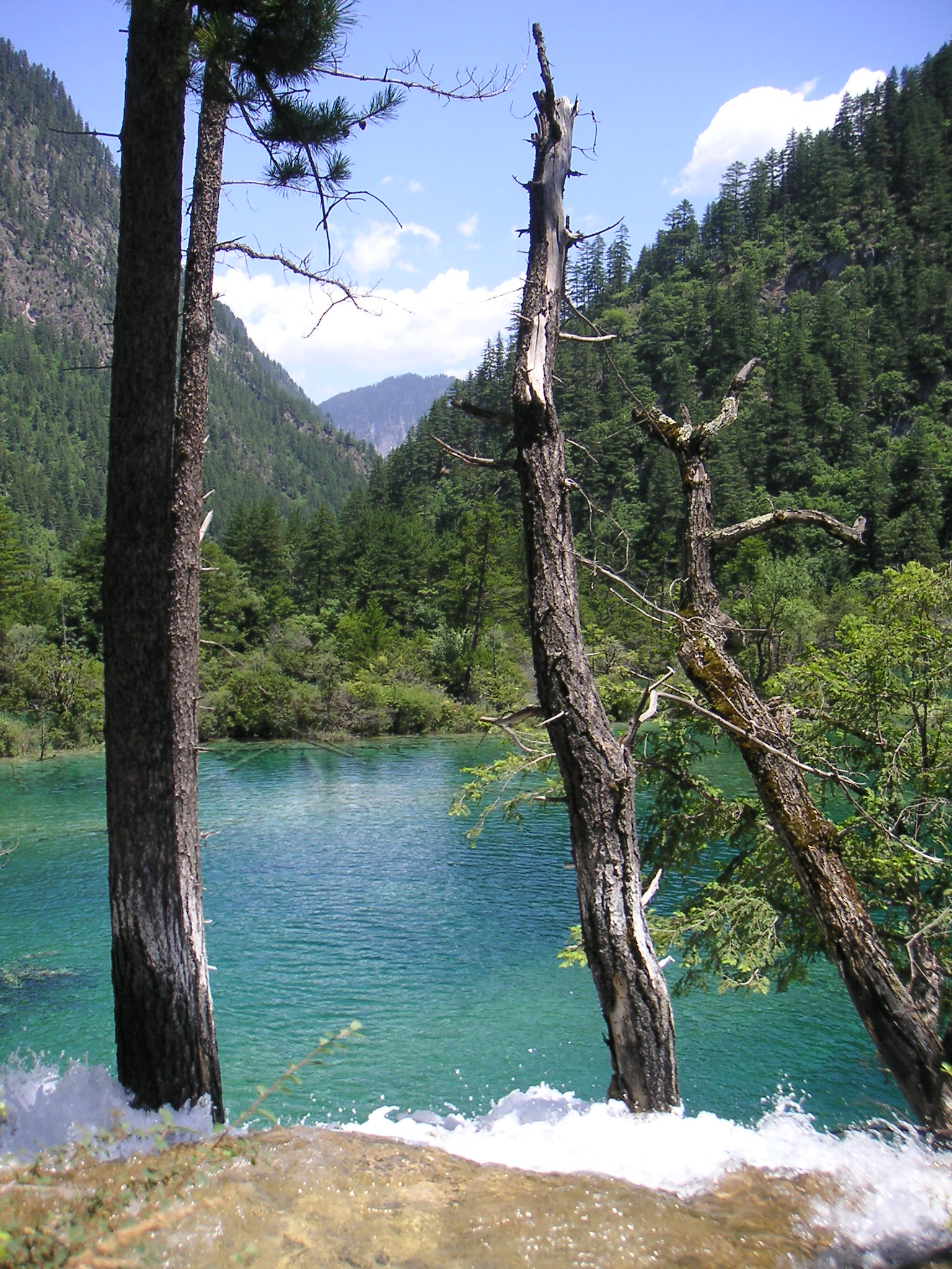 Autor: Juliane Weyher Beschreibung: Sparkling Lake, Jiuzhaigou. Quelle: selfmade